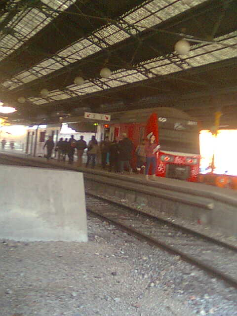 Aspeto da automotora UQE Comboios de Portugal 3577, em Alcântara-Terra (libré vermelha — introd. 2012).